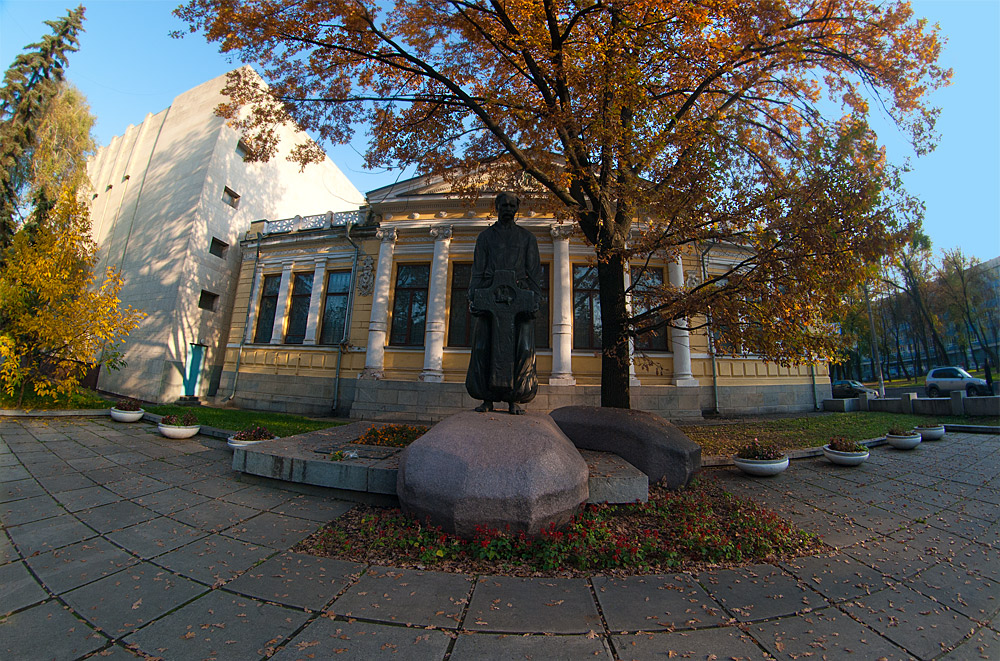 Могила історика, археолога і етнографа Д. І. Яворницького , Дніпропетровськ, просп. К. Маркса, 16